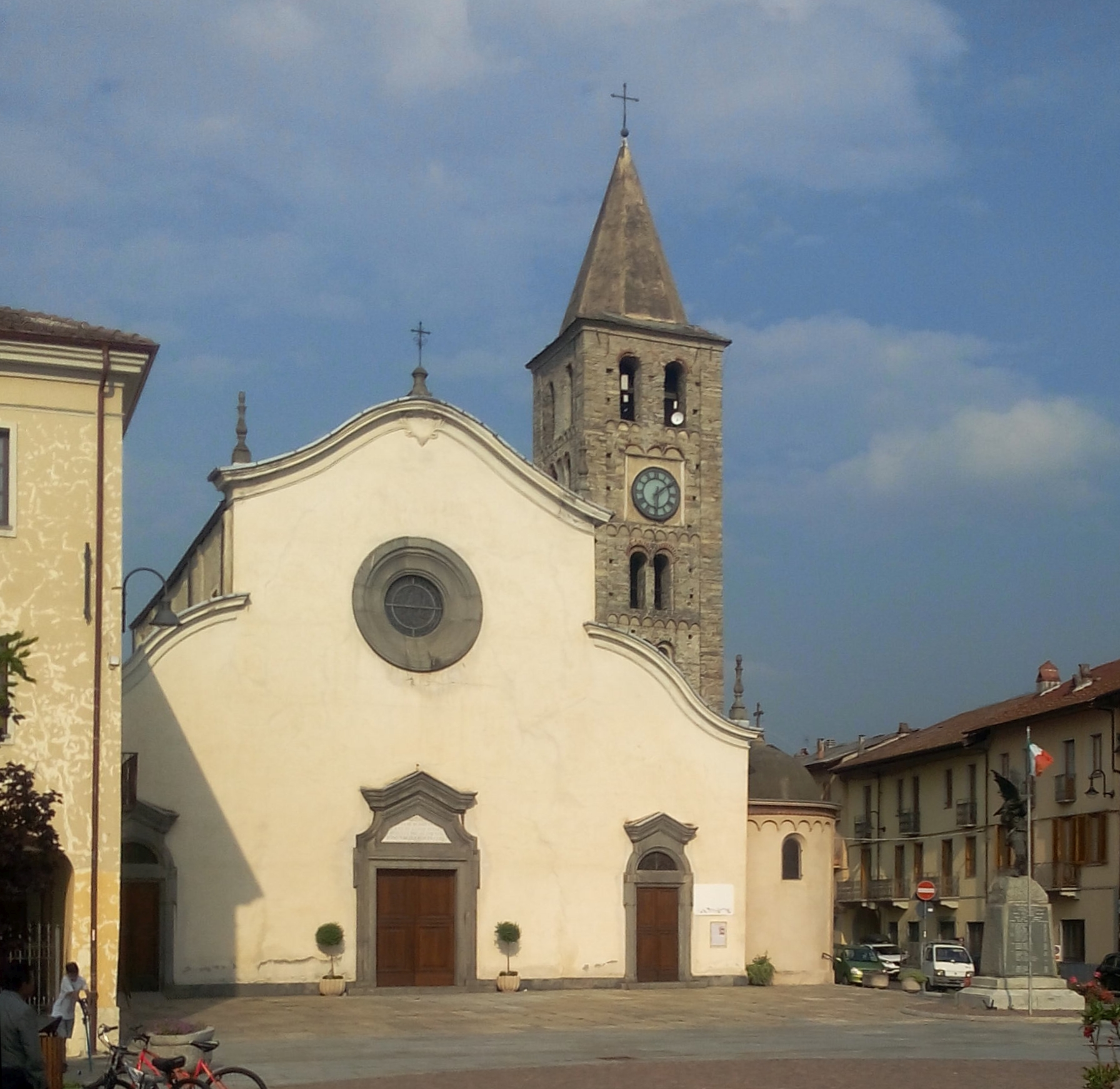 Sant'Antonino di Susa chiesa